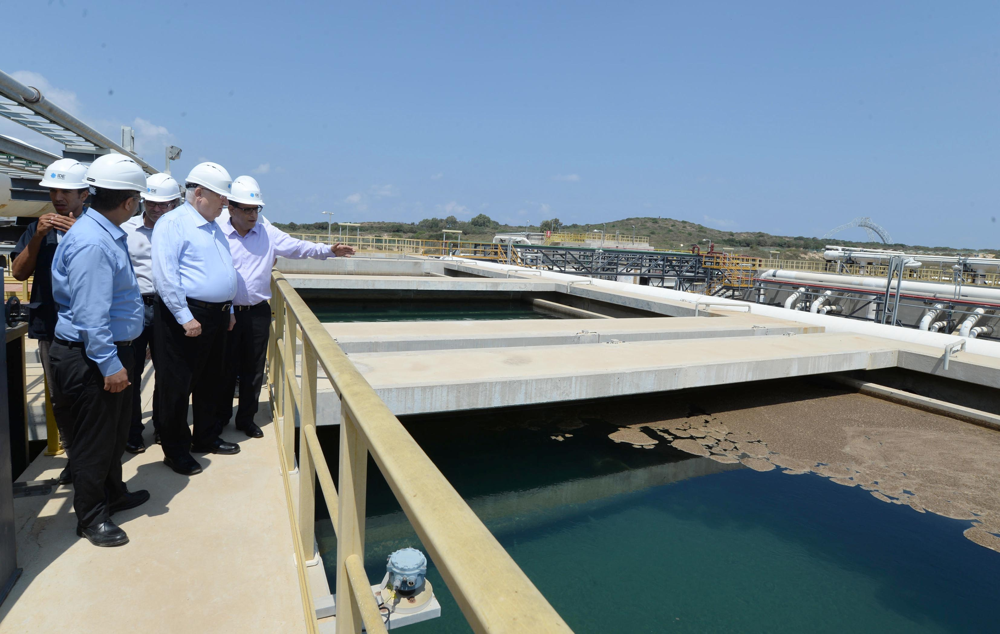 ראובן ריבלין נשיא מדינת ישראל בביקור במתקן ההתפלה שורק.